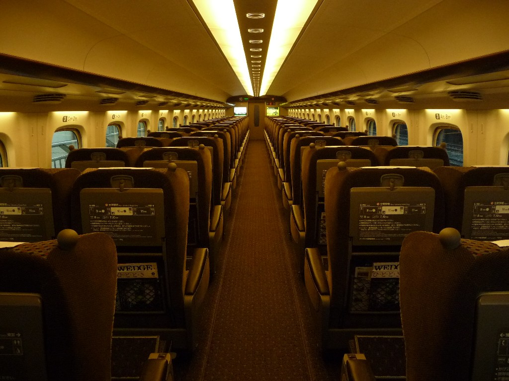 N700系新幹線グリーン車の車内。